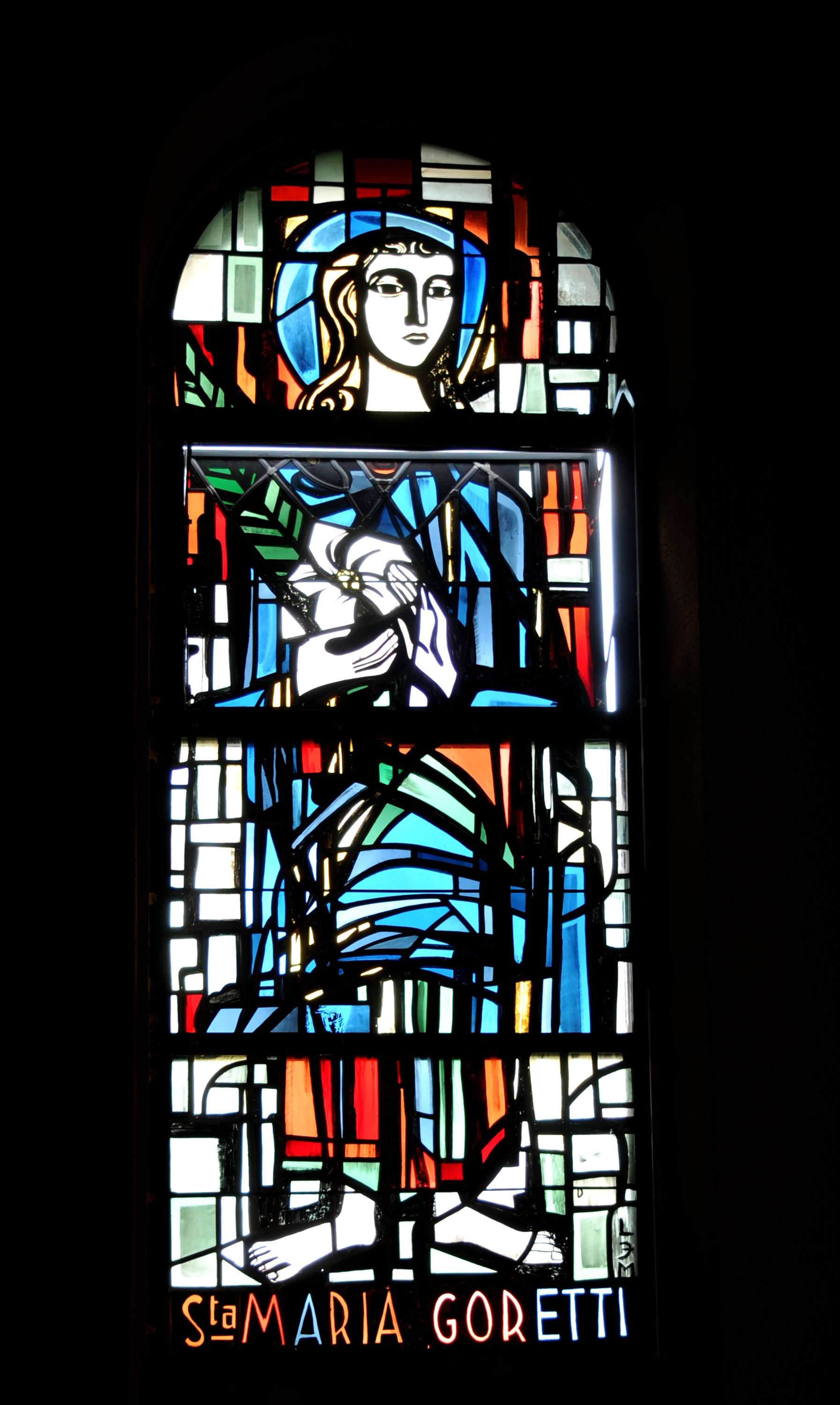 Maria-Goretti Fënster an der Kierch zu Schengen.